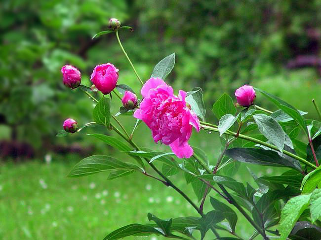 Beschreibung: Pfingstrose (Paeonia lactiflora) Aufnahmedatum: 10. Juni 2002 Fotograf: ArtMechanic